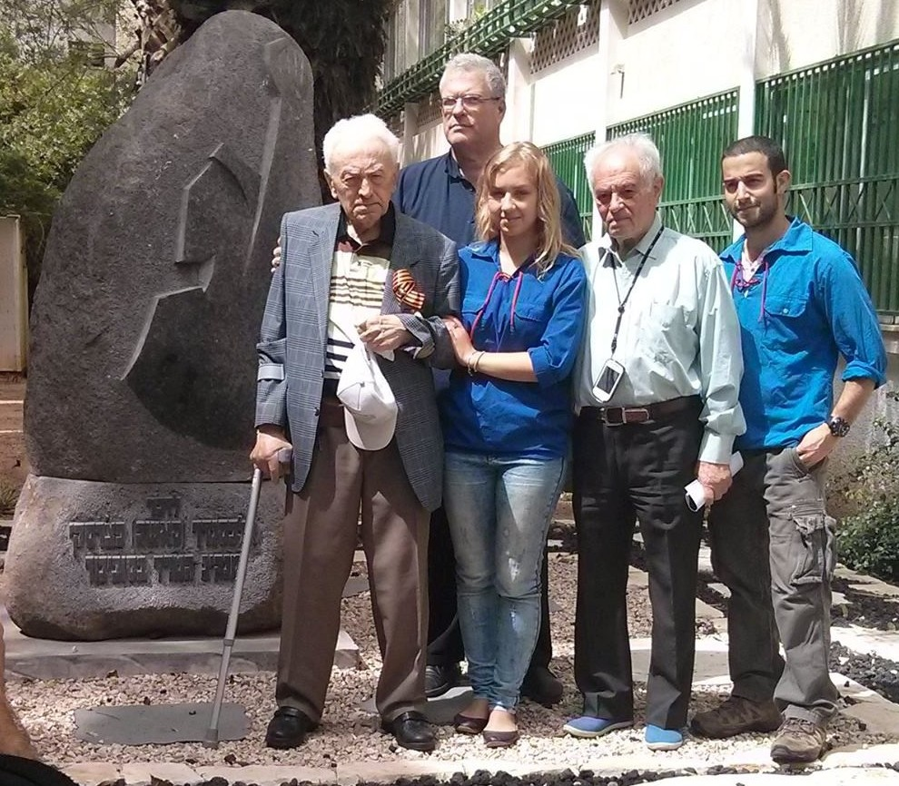 סמיון פלדמן, ניצול המרד בסוביבור, ואסיר ציון לזר לוברסקי, לצד חניכי תנועת הנוער העובד והלומד ואנדרטה לזכרו של אלכסנדר פצ'רסקי, מנהיג המרד.